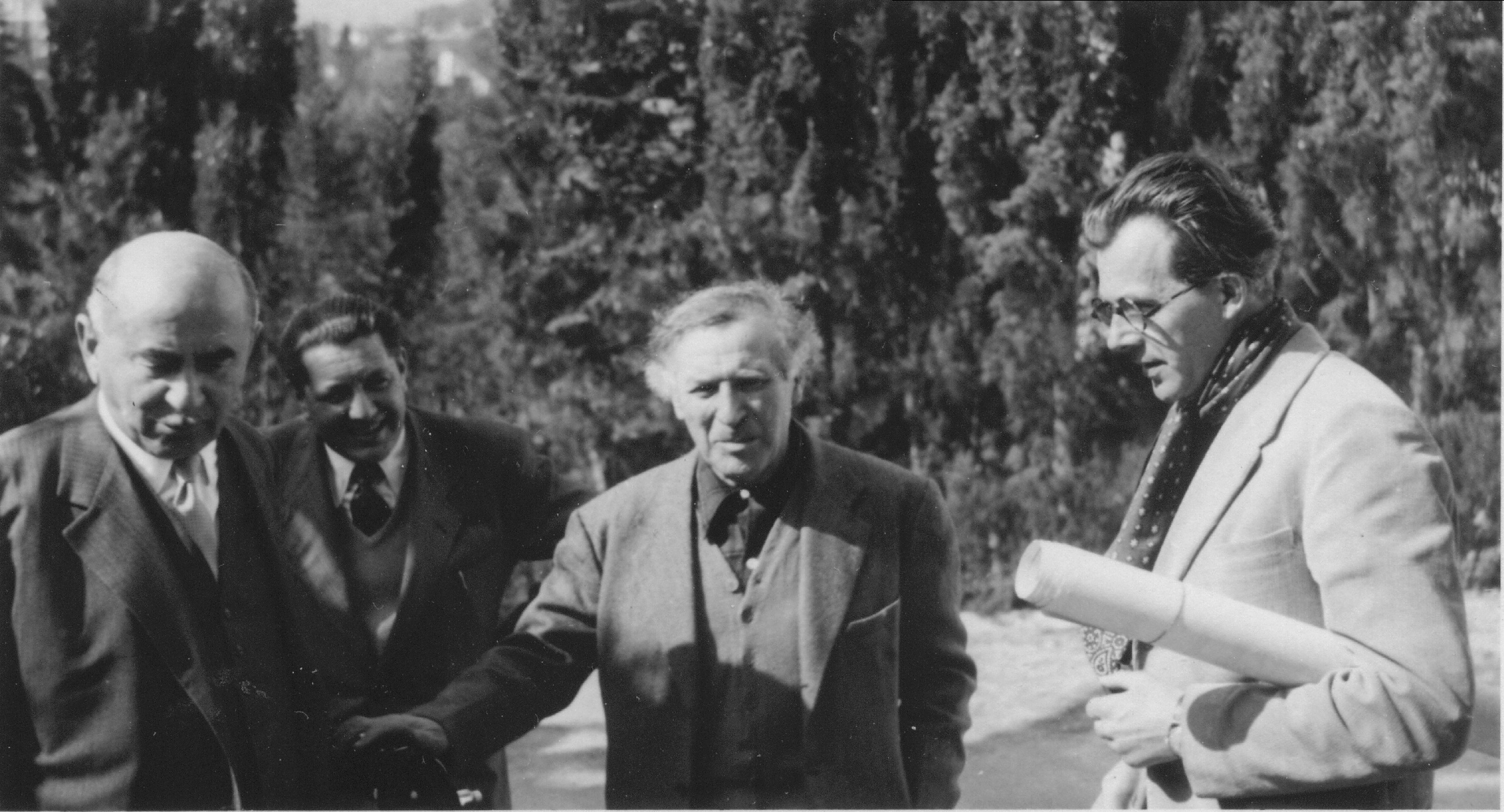 Besuch bei Marc Chagall in Vence im Jahr 1952: von links nach rechts: Bernhard Altmann, Walter Reimann (Chauffeur von Bernhard Altmann), Marc Chagall, Hans Robert Pippal